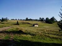 Village de Bellefosse, 67130, france